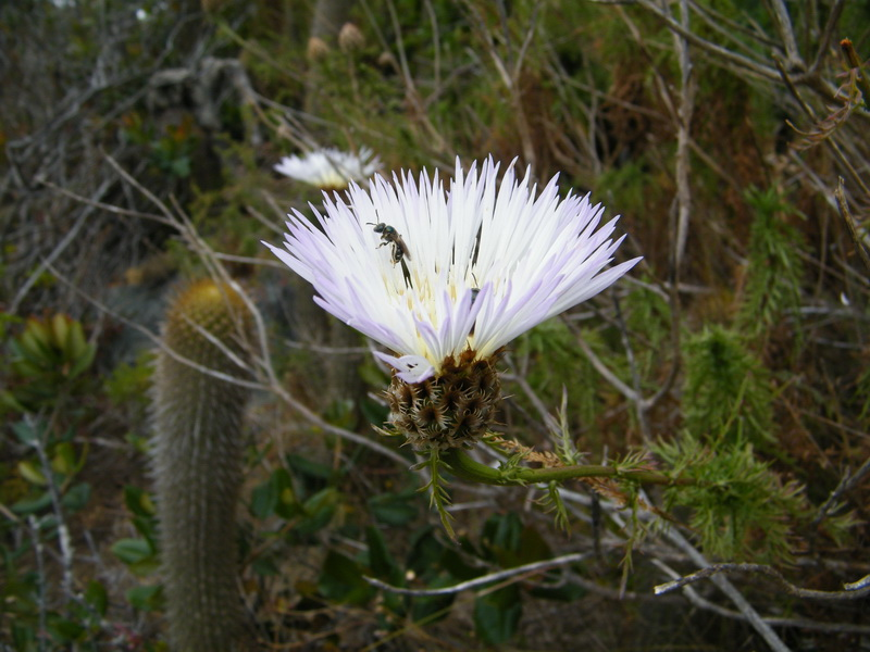 Plectocephalus chilensis. Quebrada Las Burras, 3 km al sur de Los Vilos